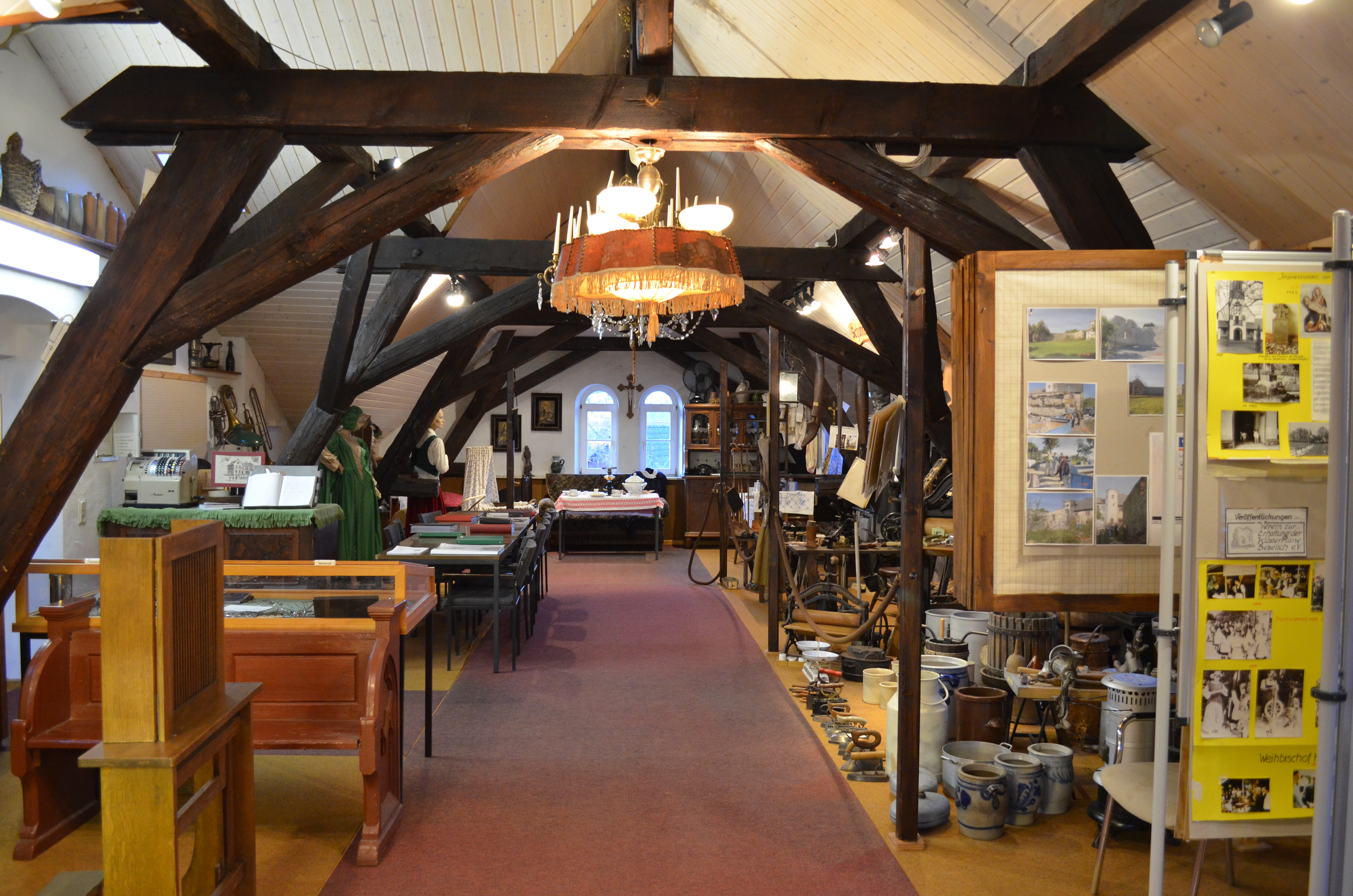 Obertiefenbach (Beselich) – Heimatmuseum – Einblick in den Hauptsaal